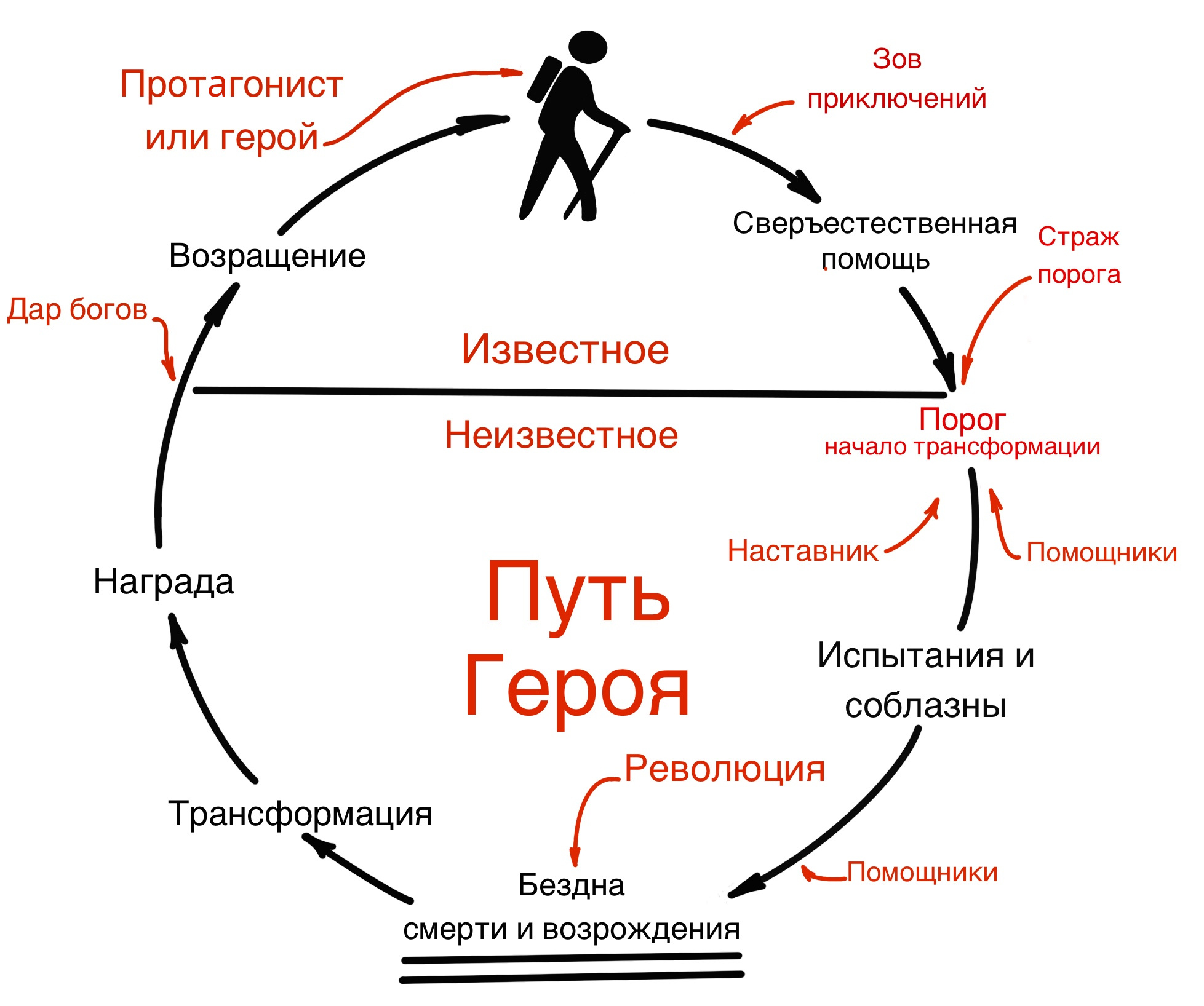 Это иллюстрация пути героя по книге «Герой с тысячью лицами».